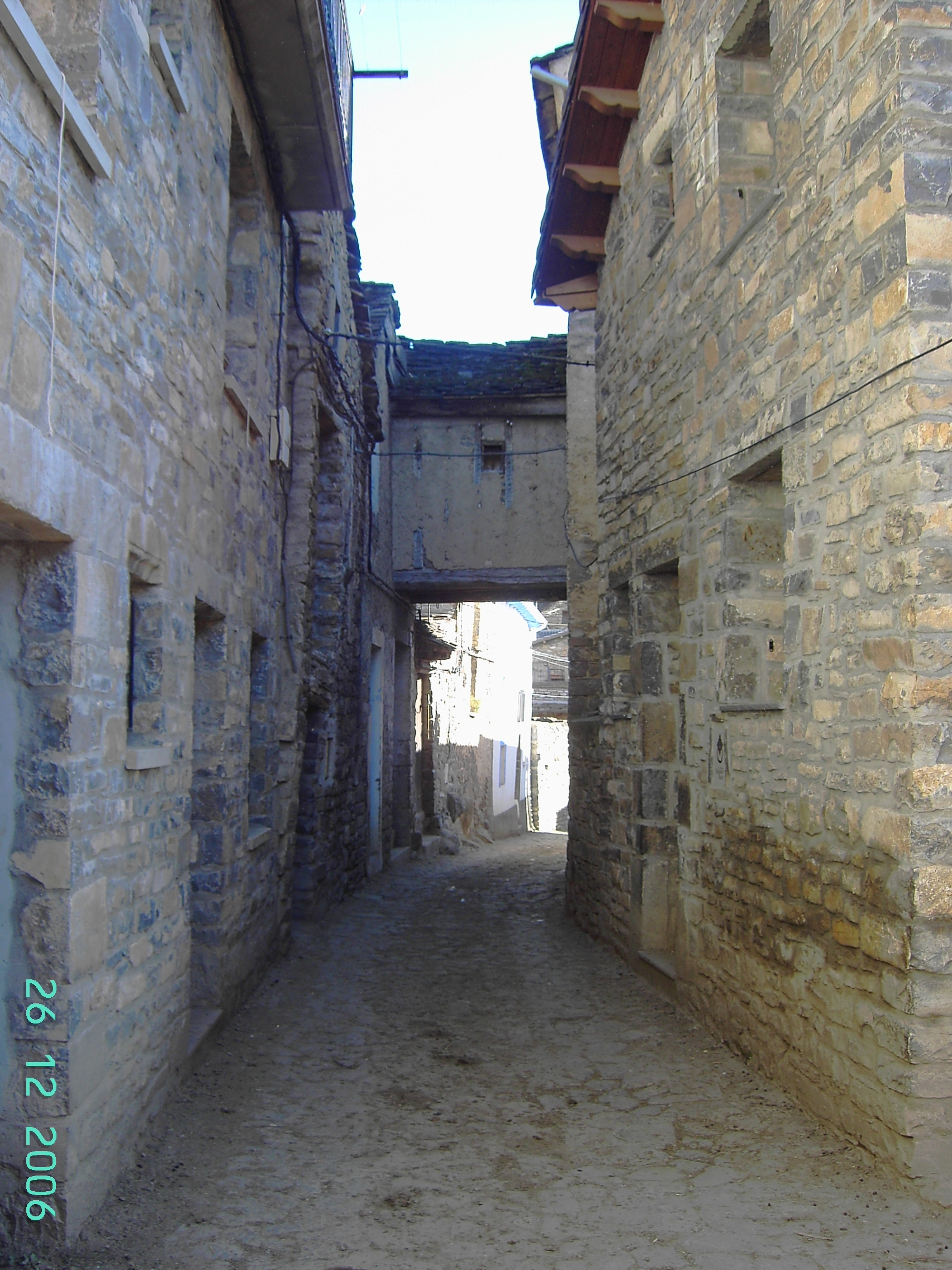 Una calle en Buesa.